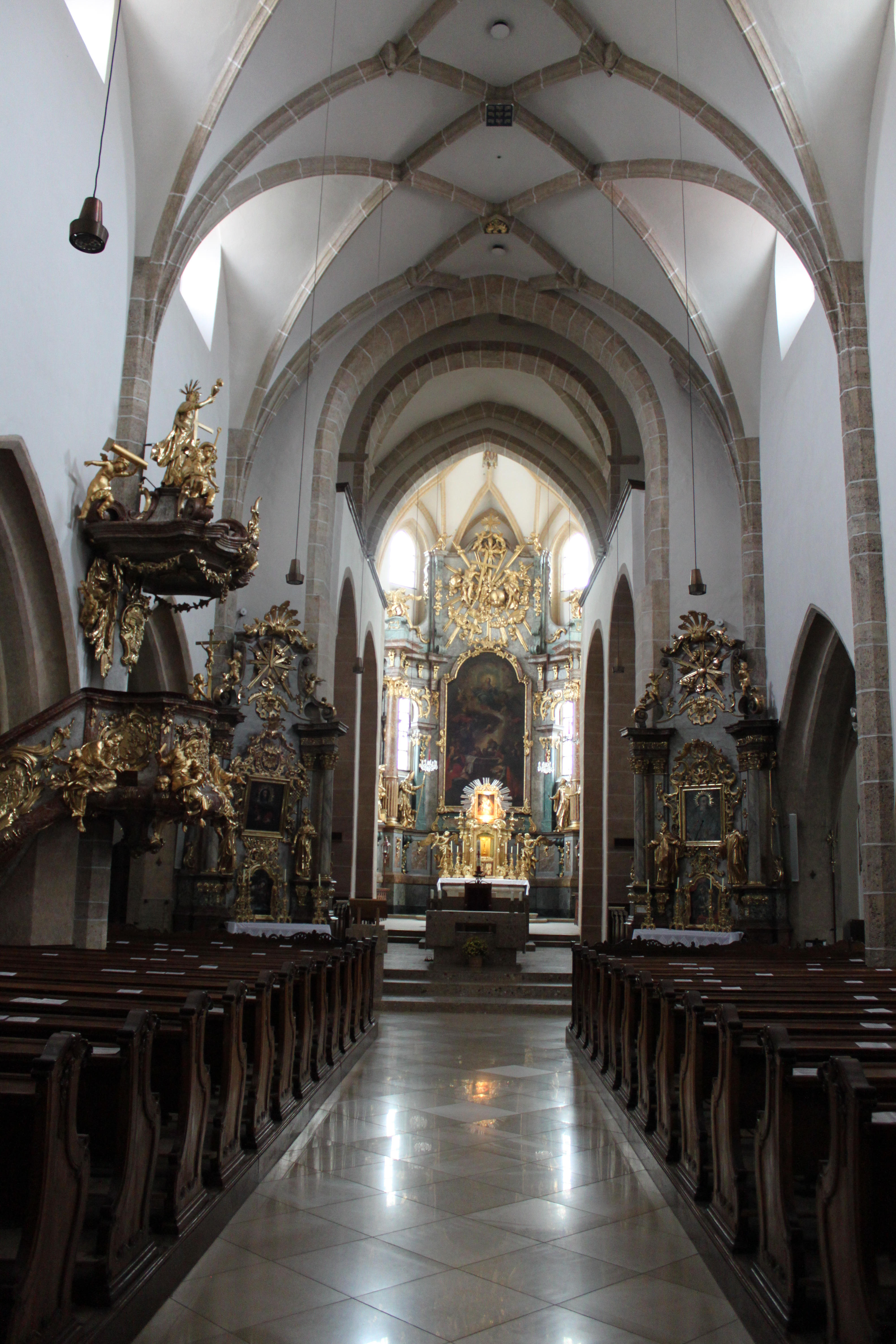 Kath. Pfarrkirche Mariae Himmelfahrt, vom Langhaus aus zum Chor